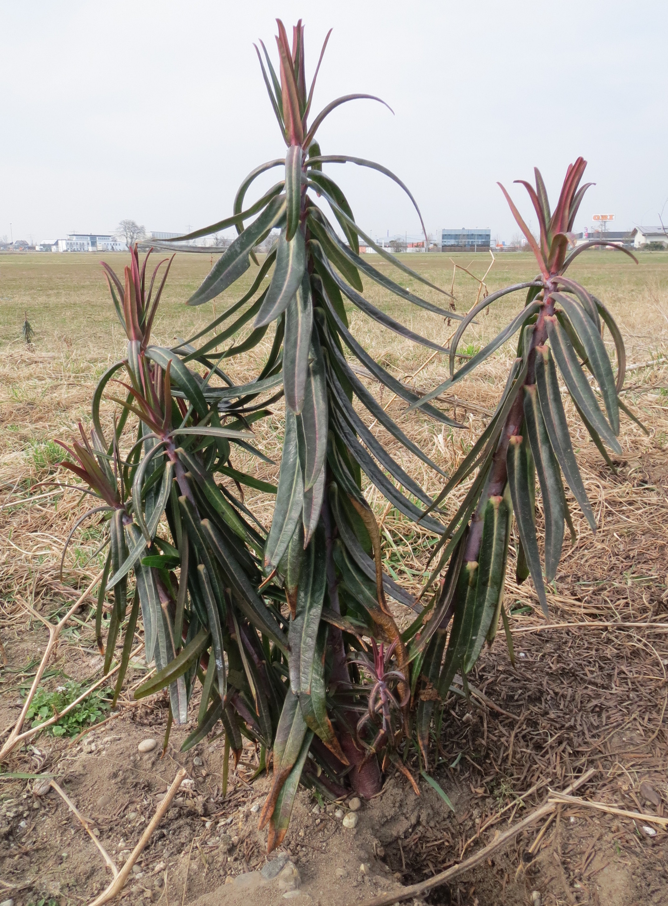 Kreuzblättrige Wolfsmilch (Euphorbia lathyris) in Hockenheim-Talhaus